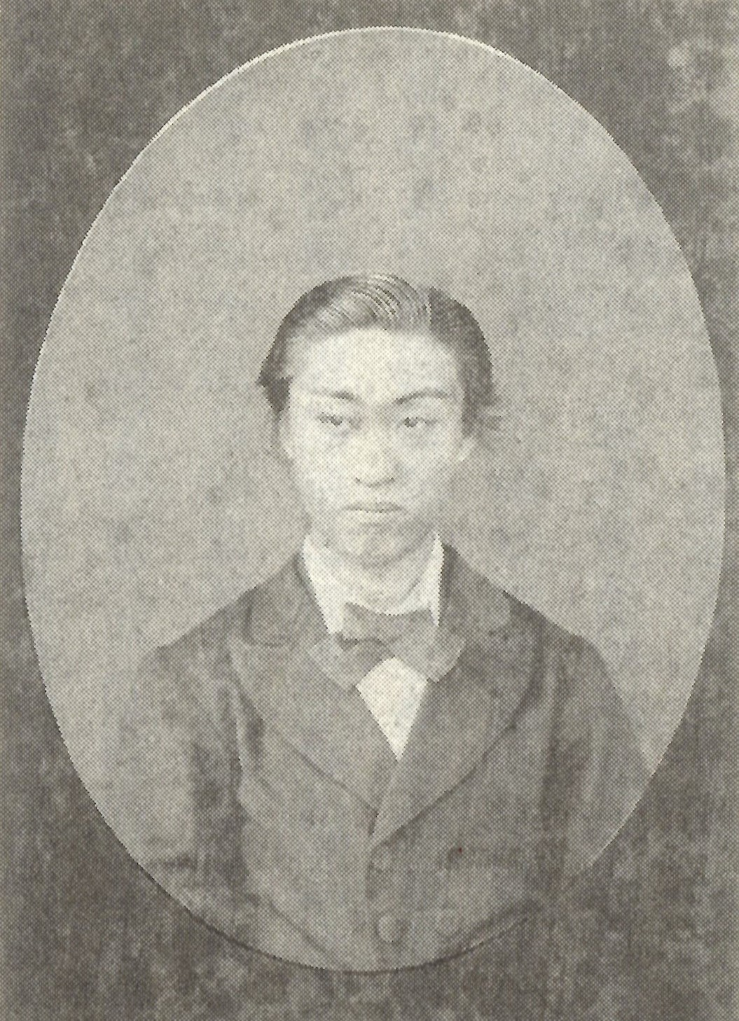 中川興長の肖像写真。